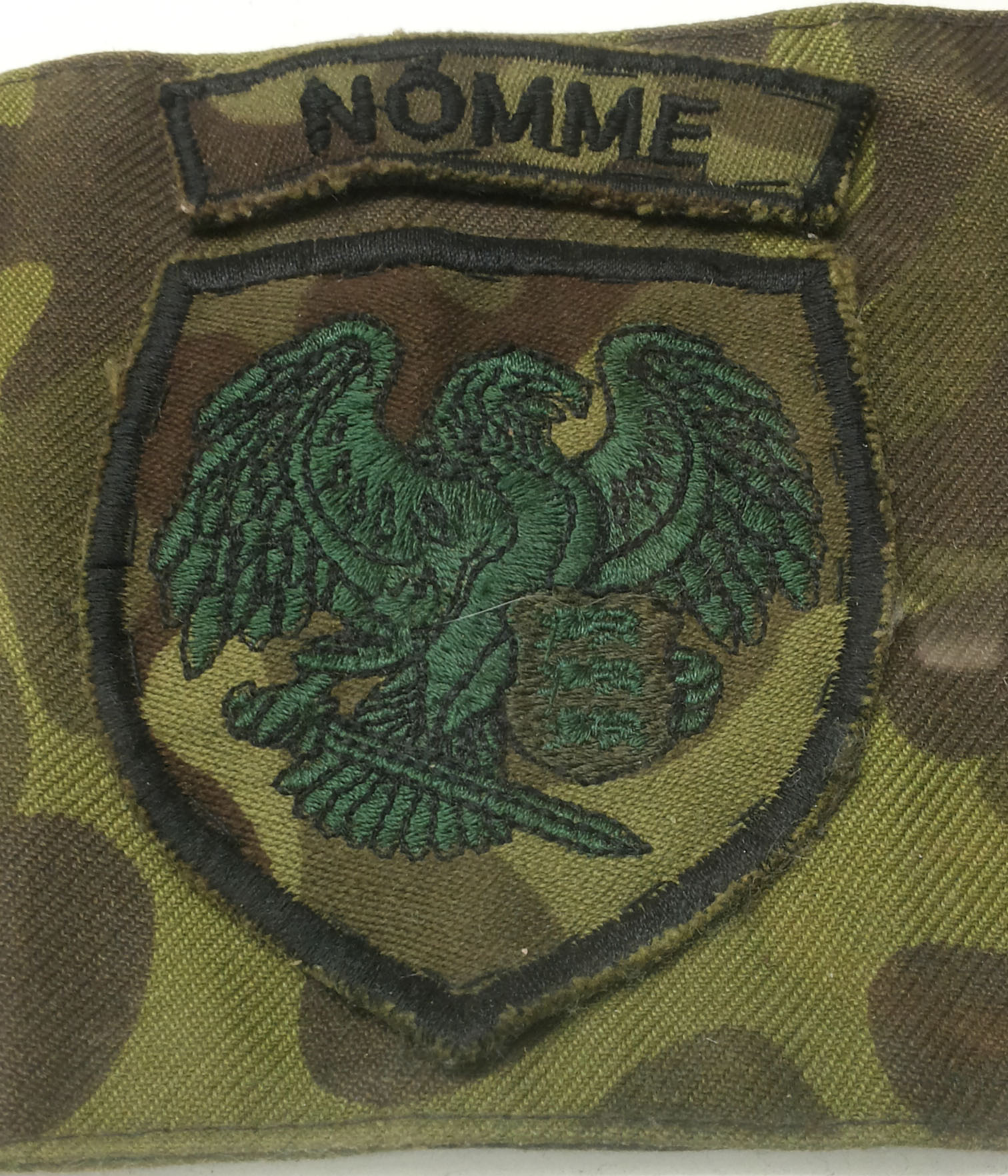 Nõmme Kaitseliidu varrukaembleem välivormile.